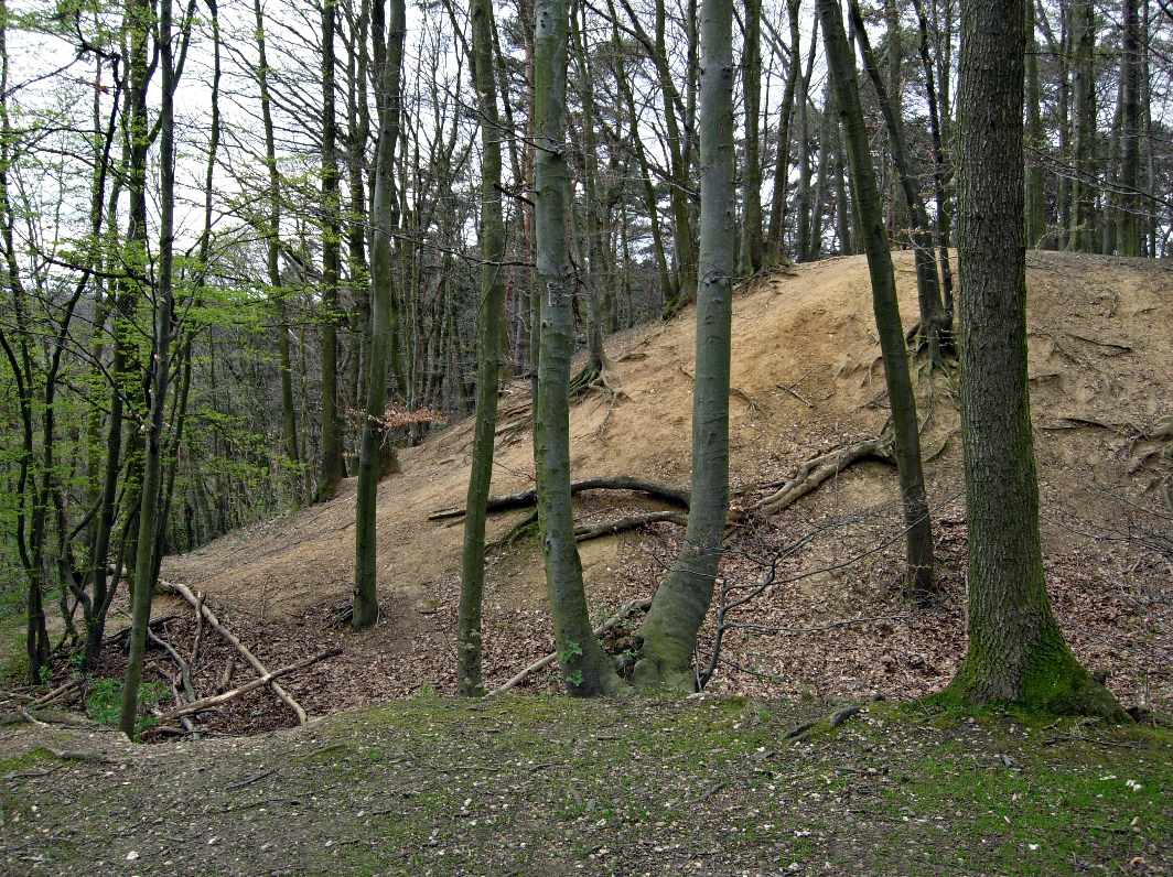 Erdwallanlage ("Burgwall") in Alfter